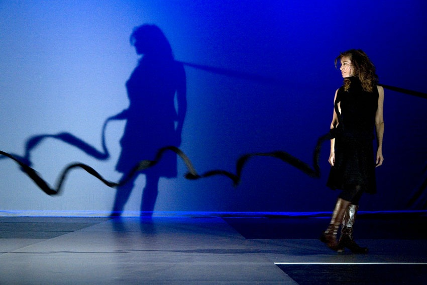 עלית קרייז במיצג Tights